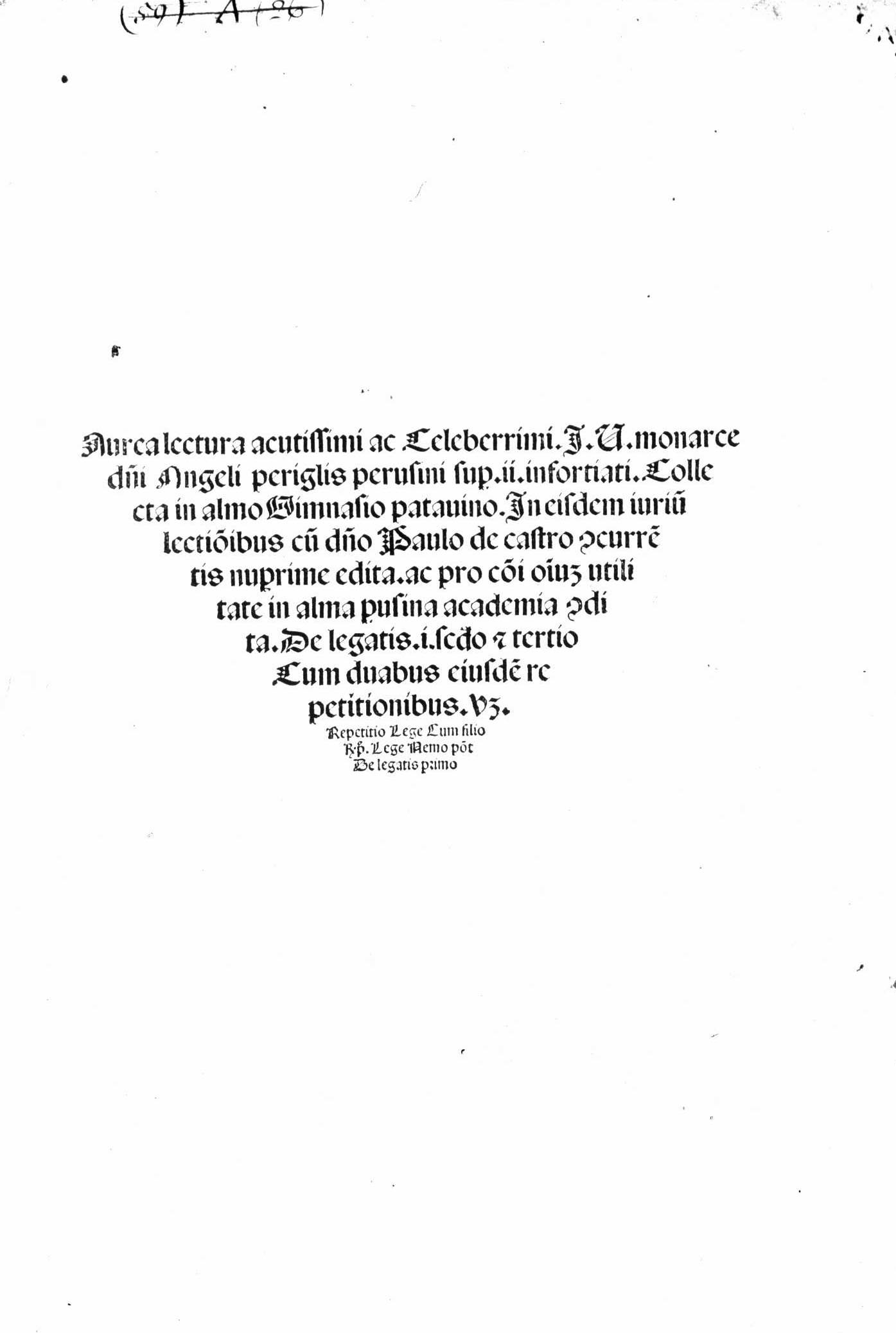 Frontespizio